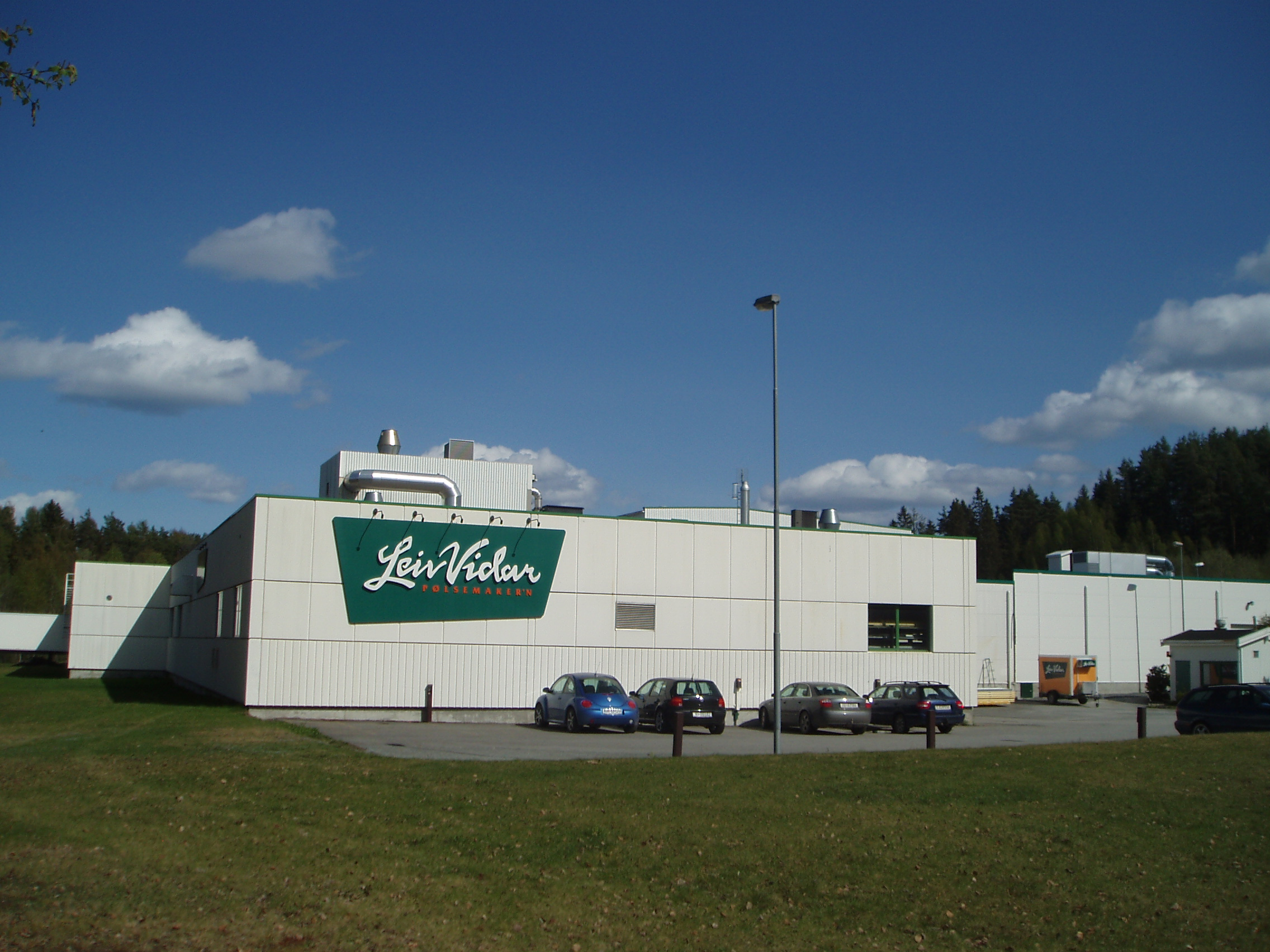 Leiv Vidars fabrikk i Hønefoss.